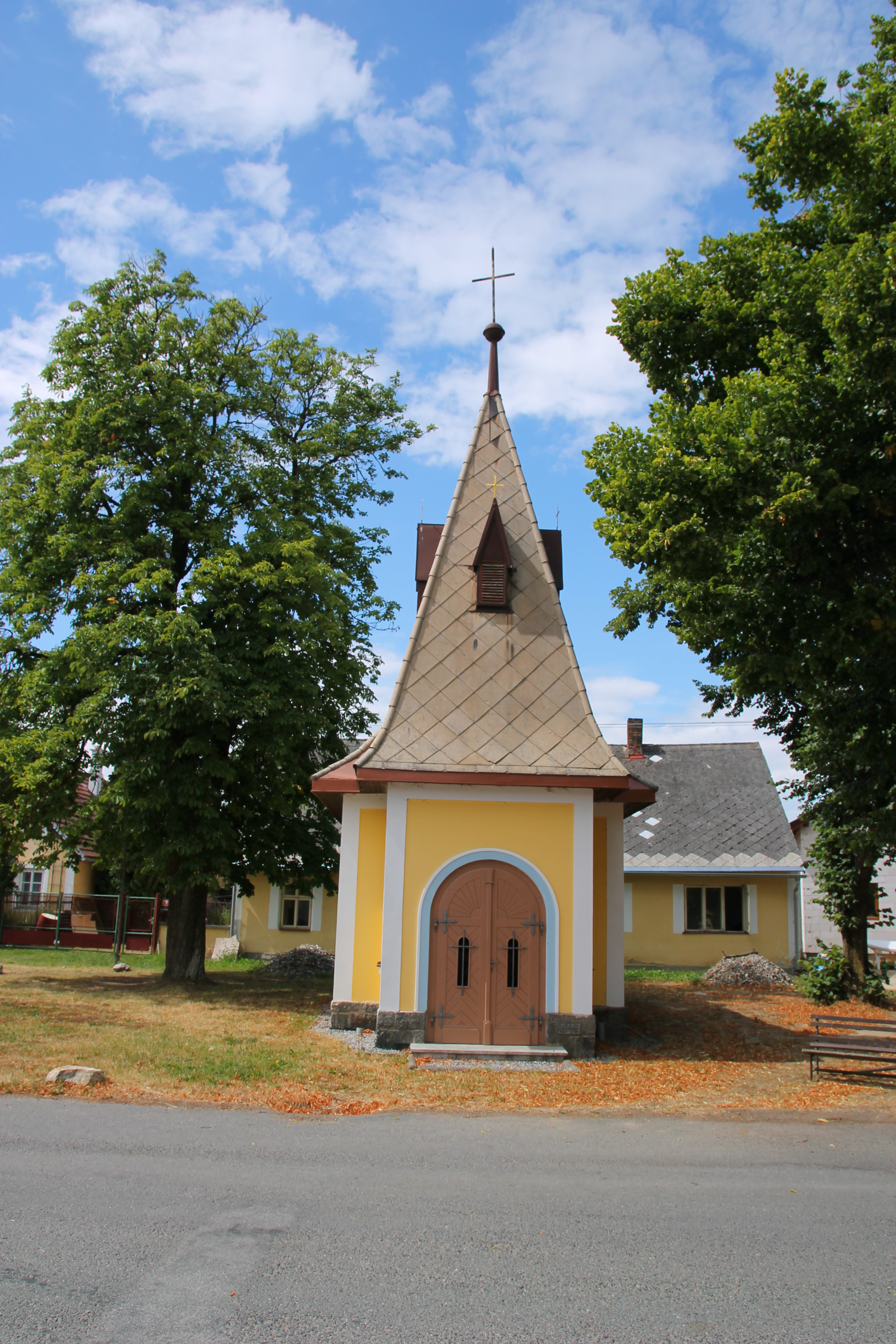 Vrbice, kaple P. M. Prostřednice všech milostí